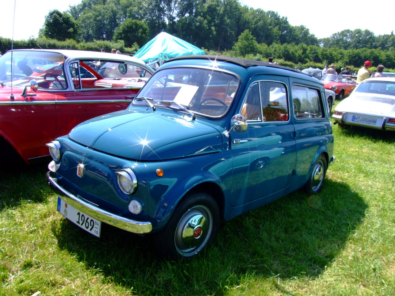 Fiat 500 Giardiniera Baujahr: 1969 17,5 PS von hinten